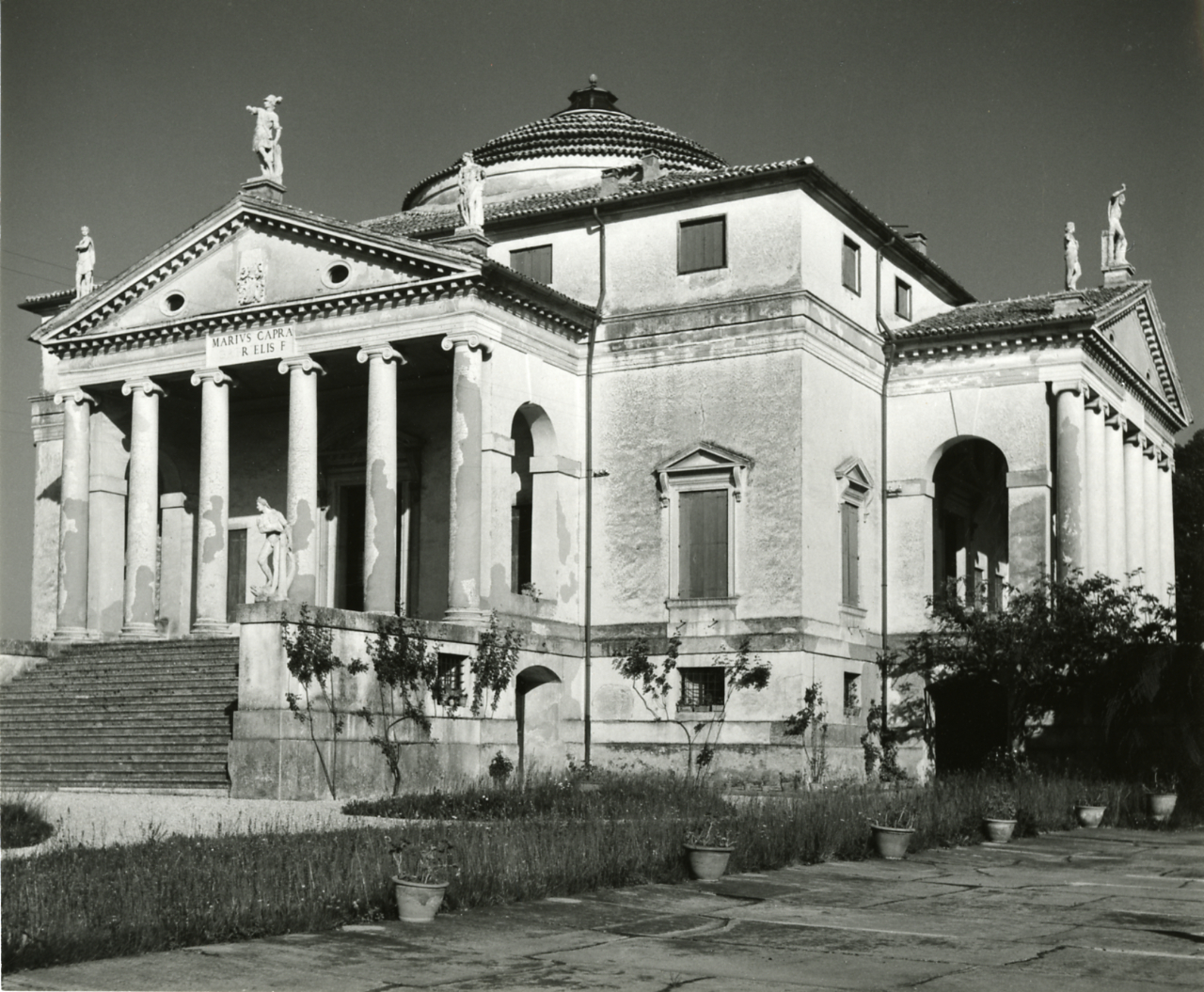 Servizio fotografico : Vicenza, 1966 / Paolo Monti. - Stampe: 8 : Positivo b/n, gelatina bromuro d'argento/ carta, 24x30. - ((Al verso delle stampe manoscritti i numeri dei negativi corrispondenti, con indicazione del fotogramma nel formato 35 mm: 12632, 12633 (lo stesso numero identifica 2 stampe - 2 copie), 12642, 12644, 12645bis (lo stesso numero identifica 2 stampe - 2 copie), 287/69; iscrizioni didascaliche con annotazioni tecniche manoscritte a matita; timbro a inchiostro con copyright (Corso Sempione - Milano). - Sul coperchio della scatola iscrizione didascalica manoscritta a pennarello nero: "Architettura/ Lombardia Veneto". - Occasione: Documentazione per la pubblicazione: Cecchi Emilio, Sapegno Natalino (a cura di), "Storia della Letteratura Italiana", 9 voll., Milano, Garzanti, 1966 e segg. - Fonte: Monografia di Cecchi Emilio, Sapegno Natalino (a cura di): Storia della Letteratura Italiana, 9 voll., Milano, Garzanti (1966 e segg.). - Fonte: Agenda di Paolo Monti: Monti/ 3 aprile 1966 - 9 marzo 1971/ 12421-16823 (1966-1971), presso Archivio Paolo Monti